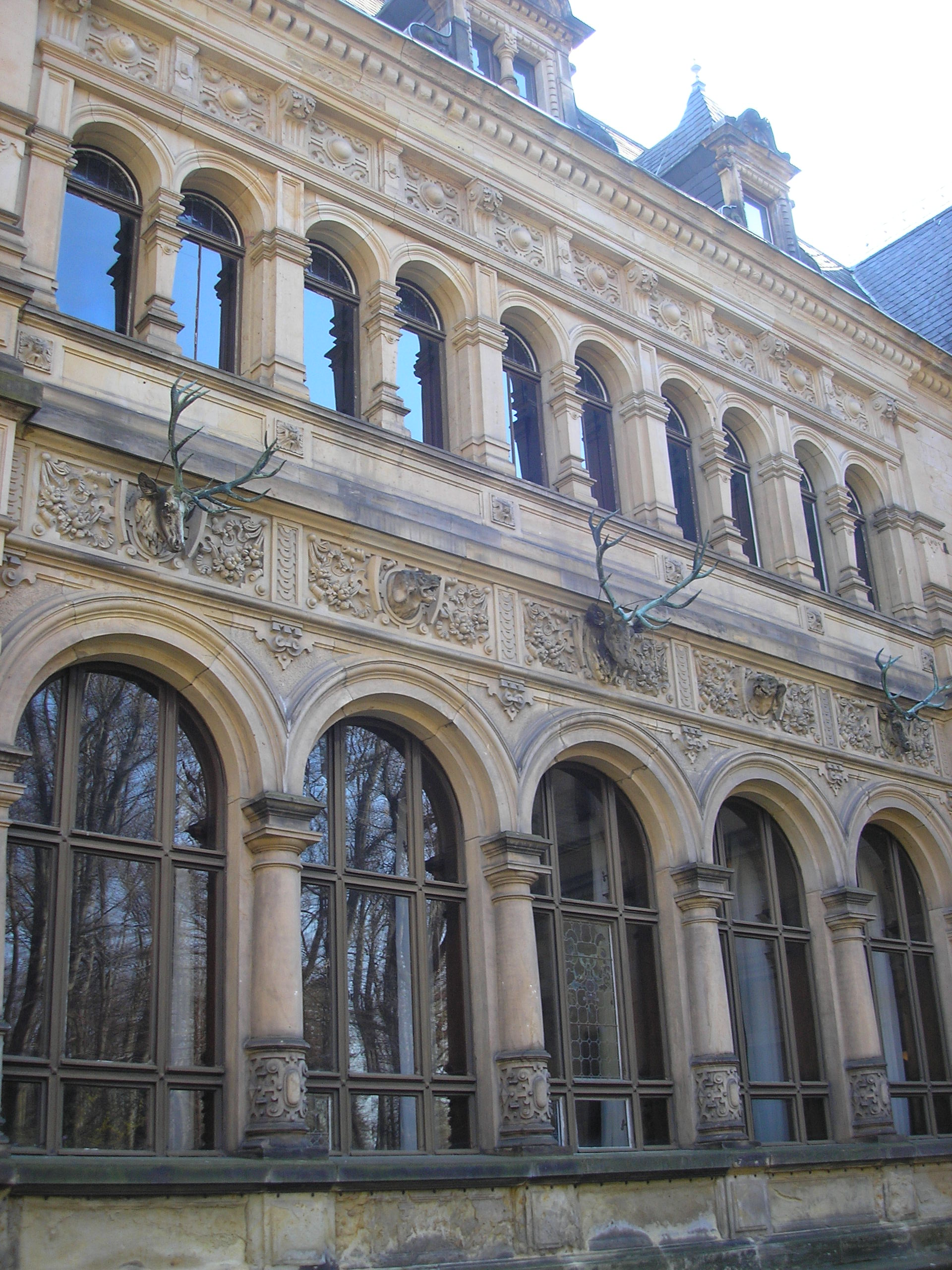 Nordfassade des Jagdschlosses in Hummelshain (Thüringen).